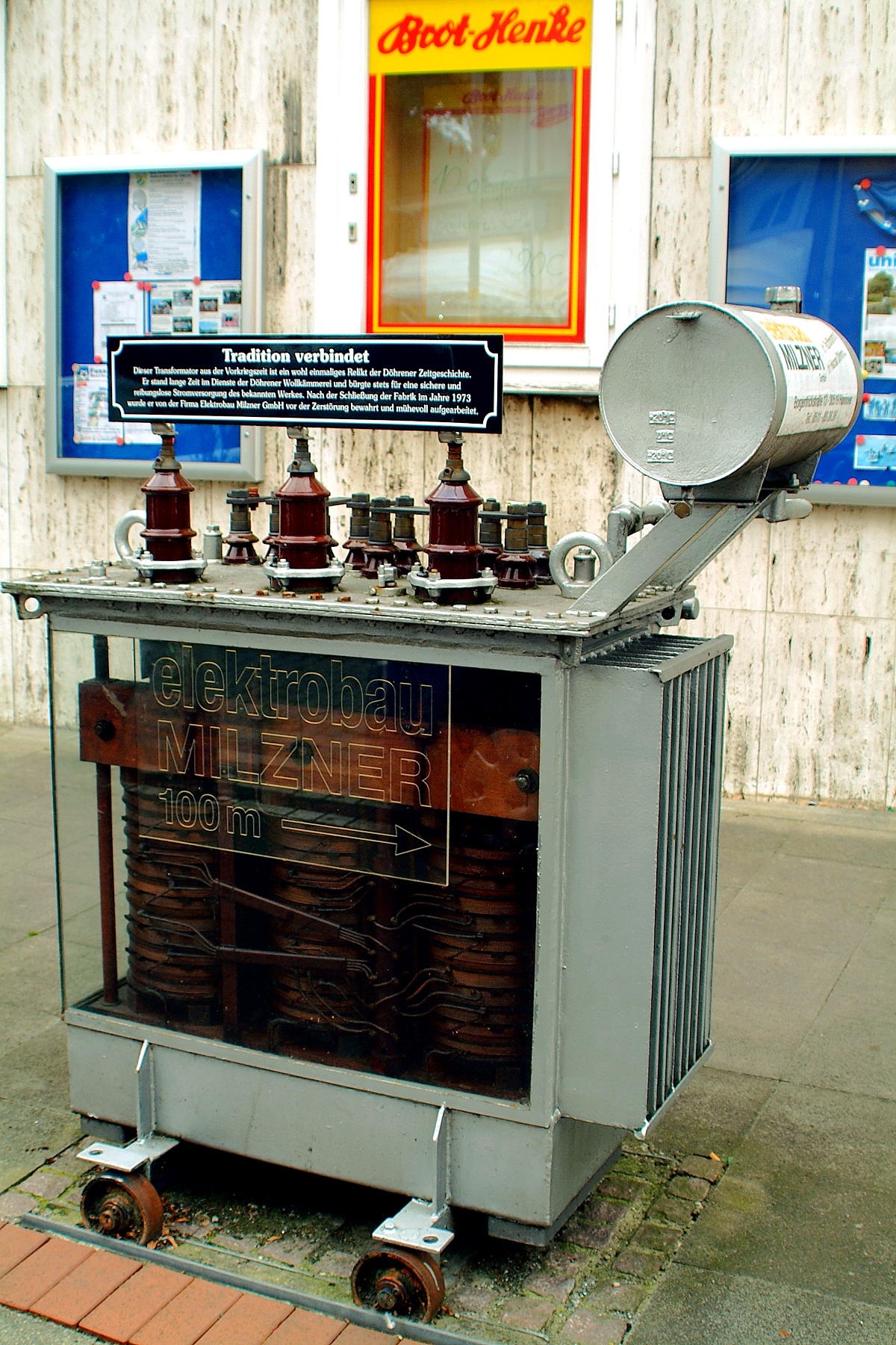 Der Transformator aus der 1973 geschlossenen Döhrener Wollkämmerei wurde von der Firma Elektrobau Milzner GmbH aufgearbeit und dann in der Borgentrickstraße öffentlich ausgestellt ...